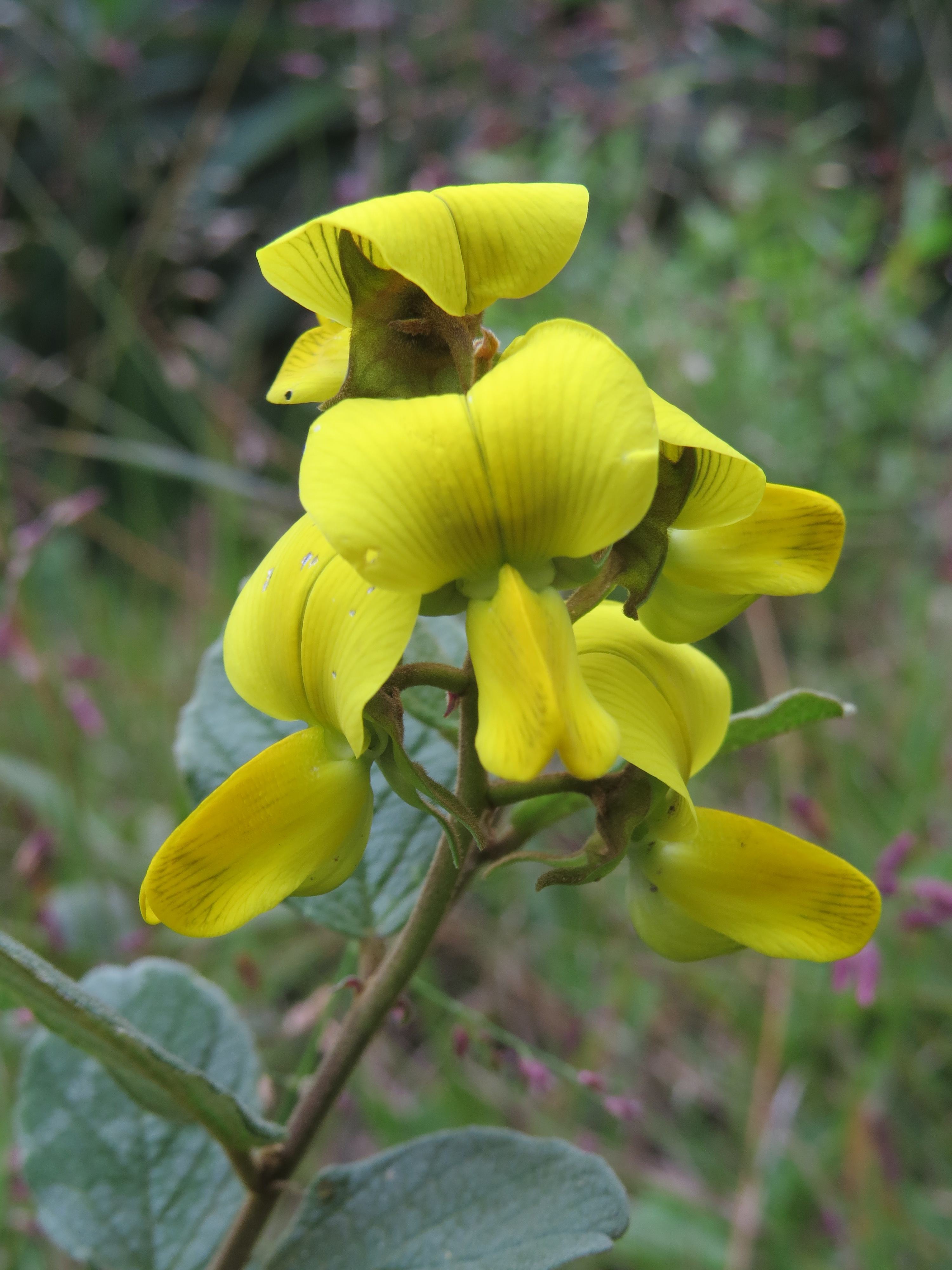 Photos taken at Mannavan Shola, Anamudi Shola National Park, Kerala during Munnar Butterfly Survey